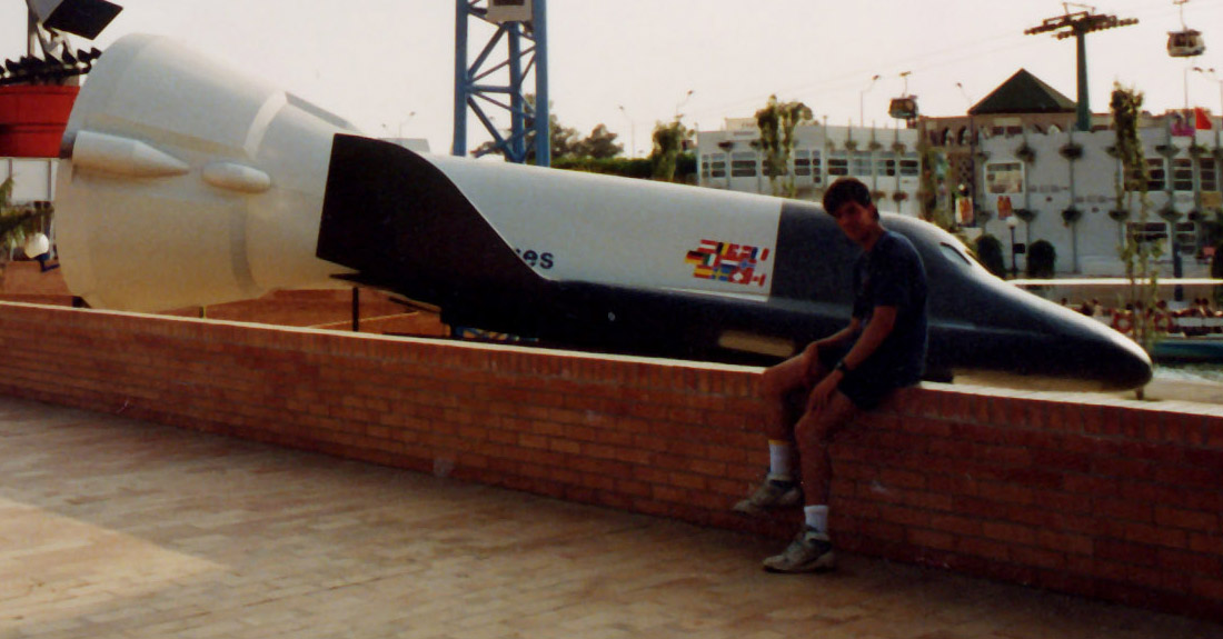 Maqueta 1:1 del proyecto de lanzadera europea Hermes